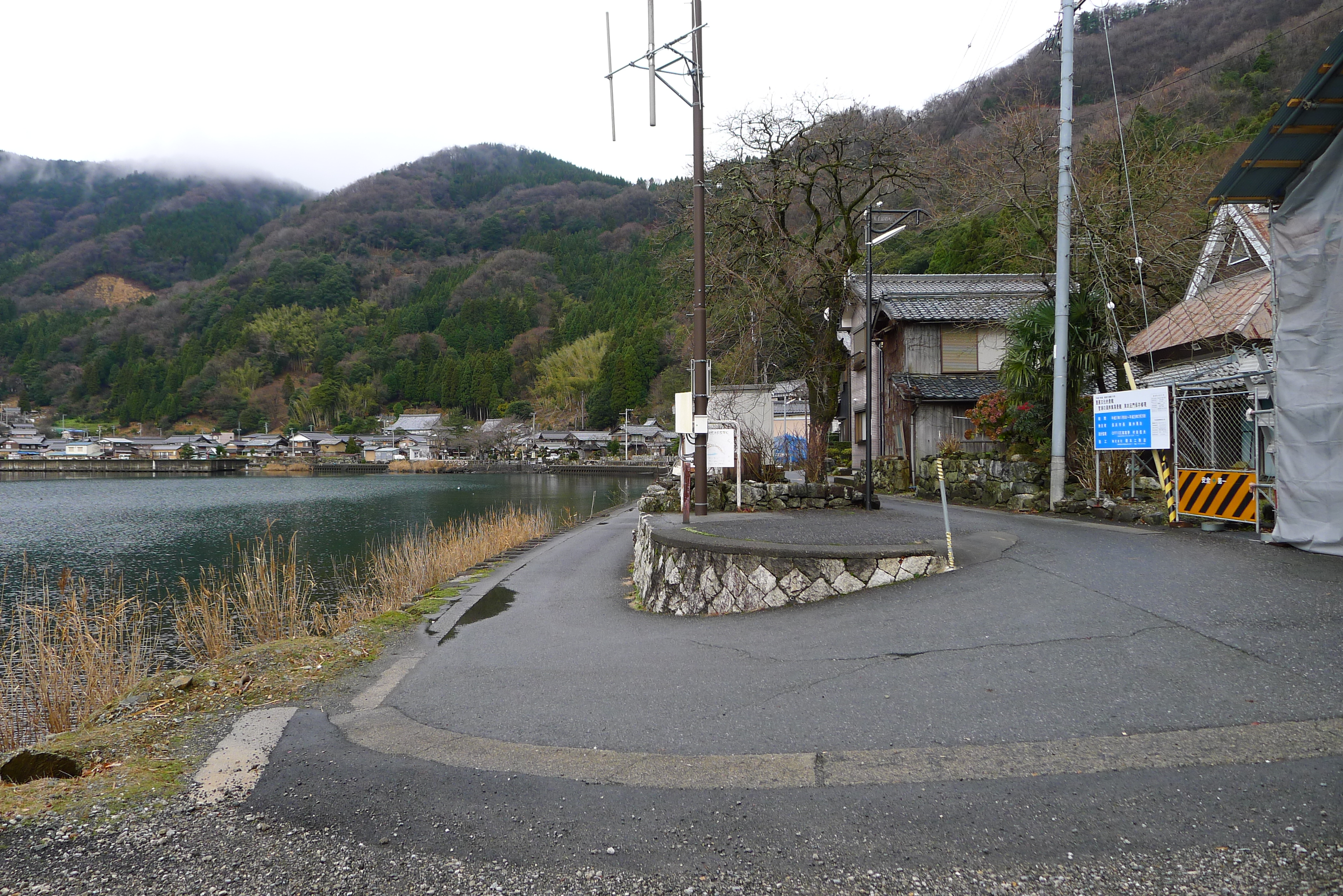 「菅浦の湖岸集落景観」：集落の東端でハマミチ（浜道）が折り返す、画面右端に四足門がある（修復工事中）